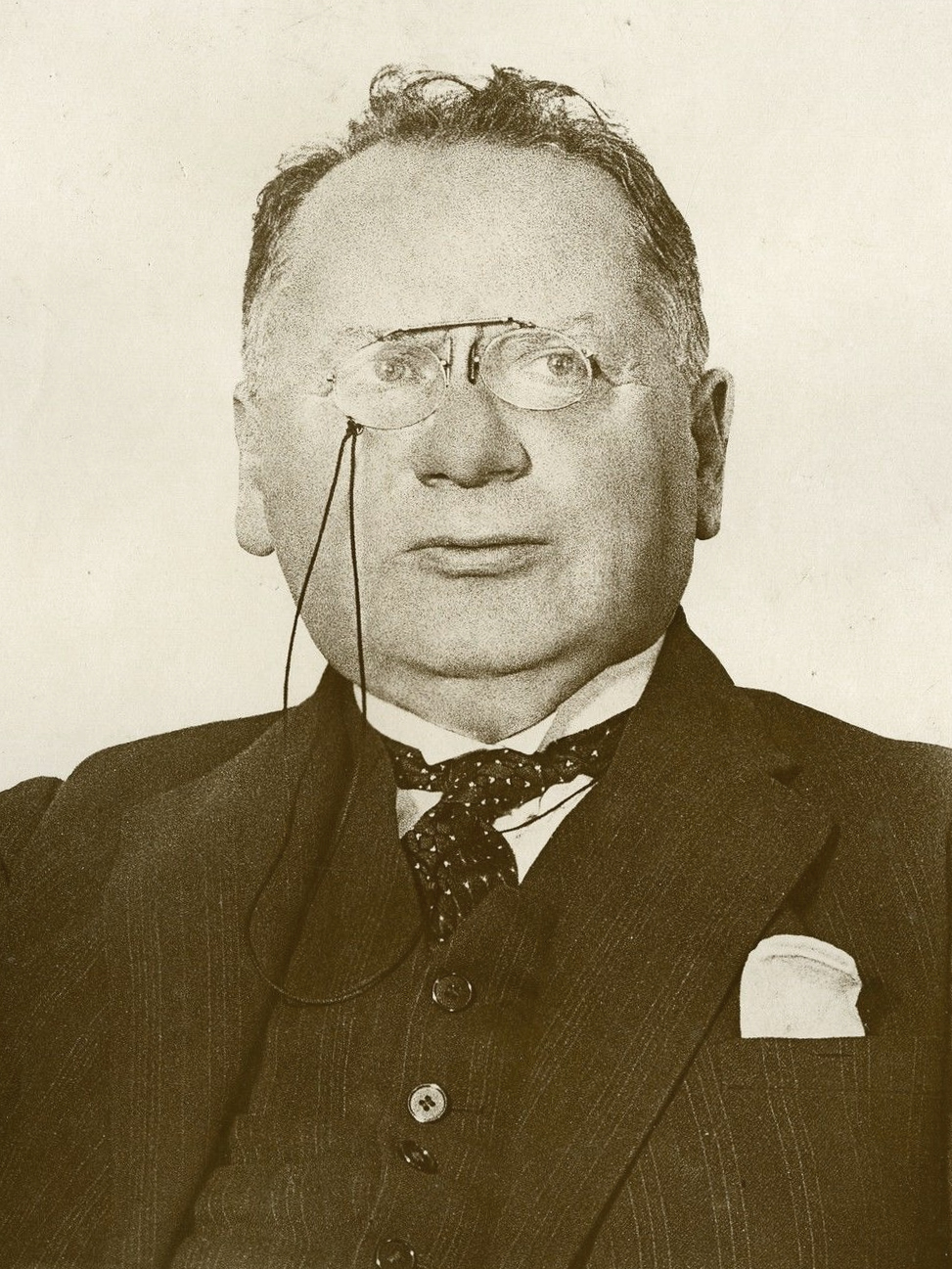 "Mr LITVINOFF (CONFERENCE du DESARMEMENT 1932)" Photo originale G.DEVRED / ROL